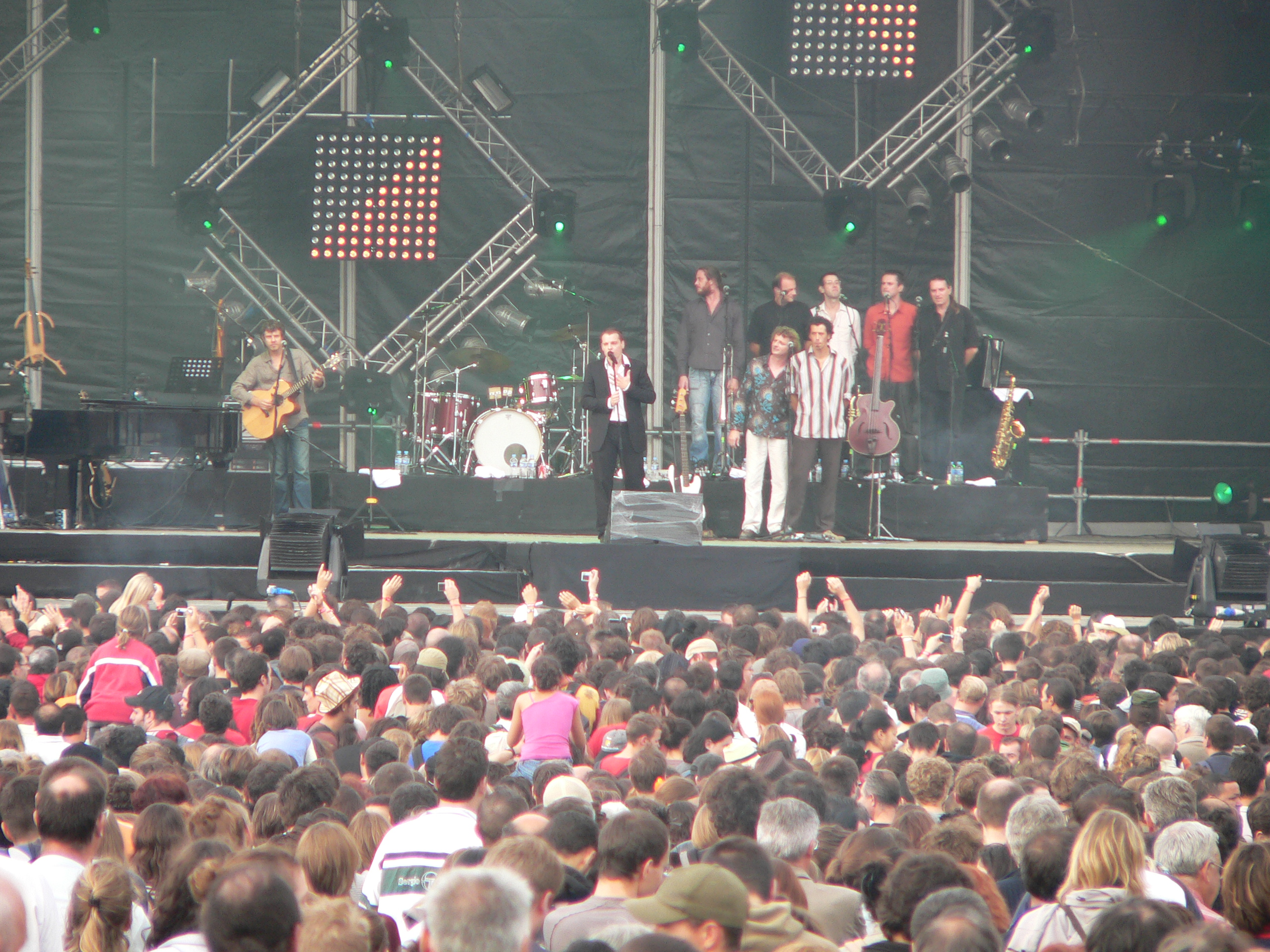 Fête de l’Humanité, 15 July 2006-17 July 2006